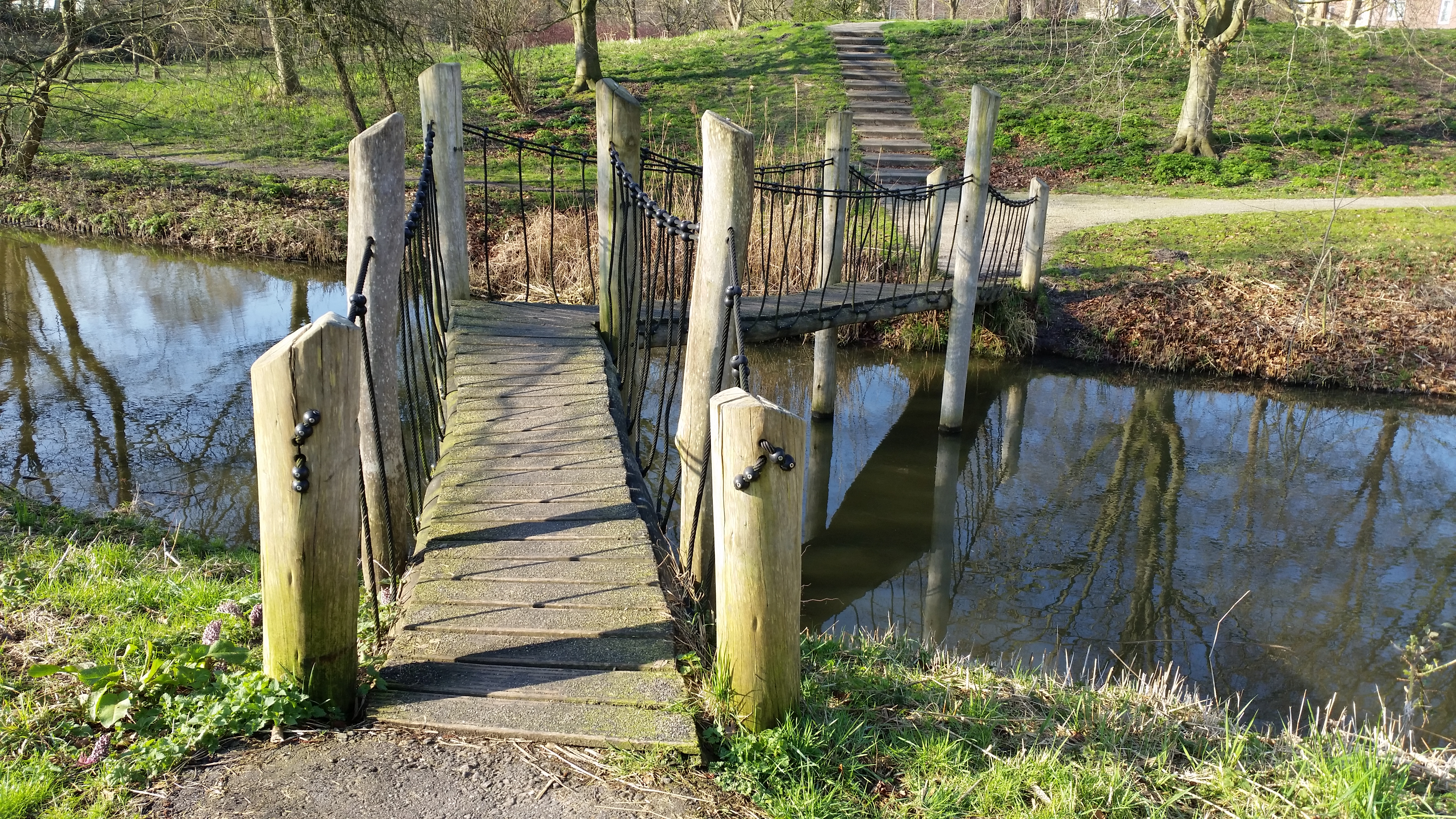 Impressie van de speelburg en omgeving in het Meerpark, Watergraafsmeer (maart 2020)